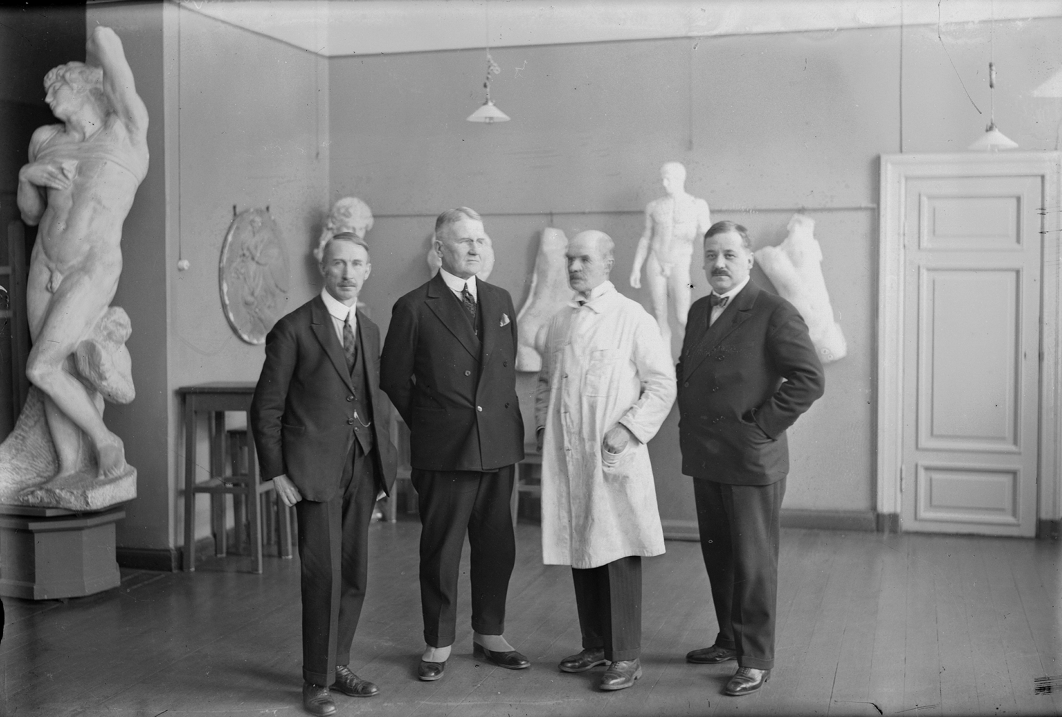 Suomen Taideyhdistyksen koulun opettajia vuonna 1930. Vasemmalta oikealle: koulun rehtori Uuno Alanko, tuntematon mies, anatomian opettaja Viktor Malmberg ja taidehistorian opettaja maisteri Edvard Richter.